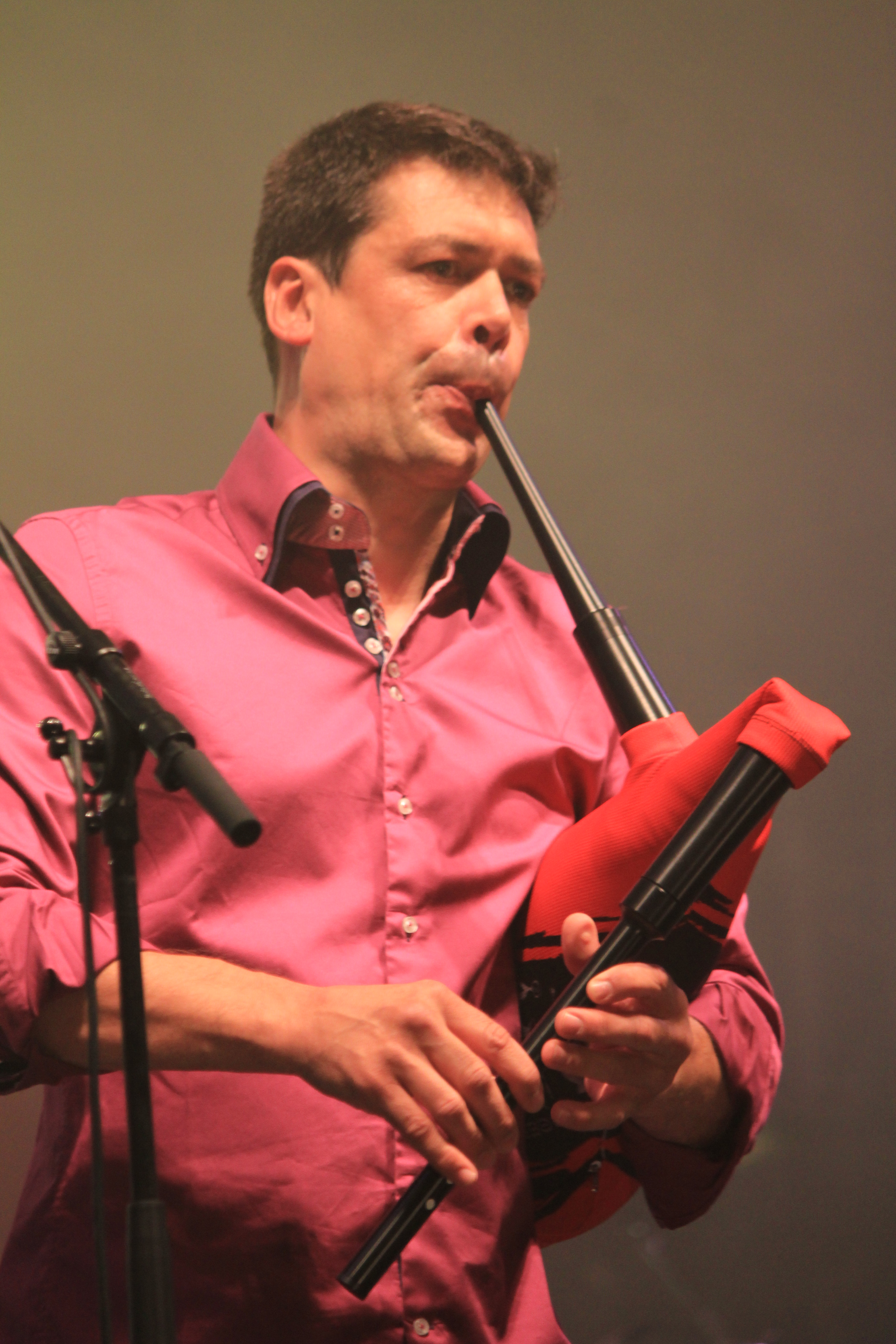 José Angel Hevia lors d'un concert lors du festival interceltique de Lorient 2013